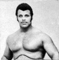 Scott Casey sur un programme de catch du 29 décembre 1975.